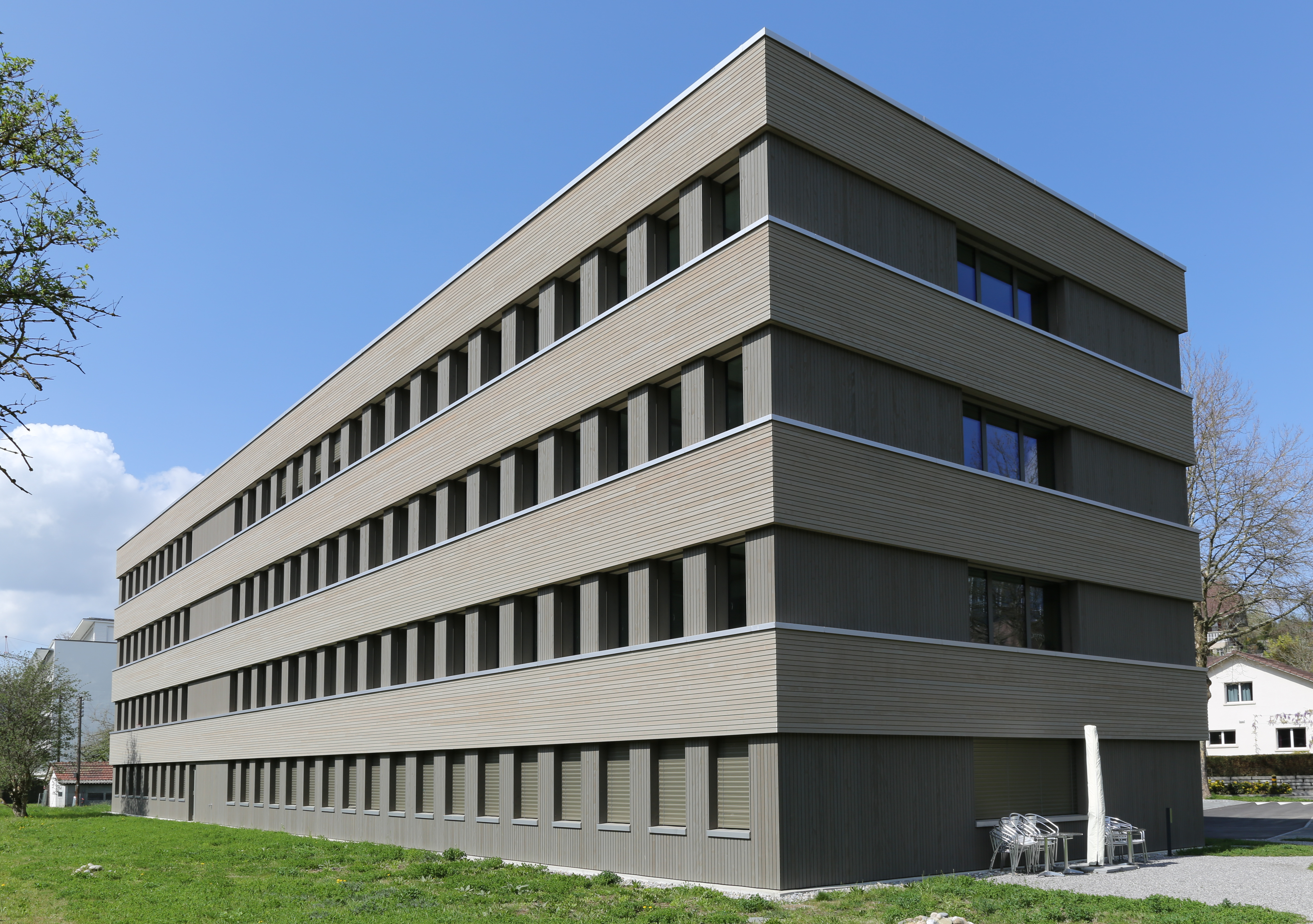 Bundesamt für Raumentwicklung ARE in Ittigen, Ansicht aus südöstlicher Richtung